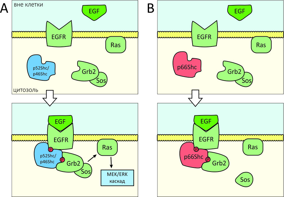 Схема участия белков Shc в ответе на митогенные сигналы. А - схема для p52Shc и p46Shc, В - для p66Shc. Необходимые пояснения в тексте.